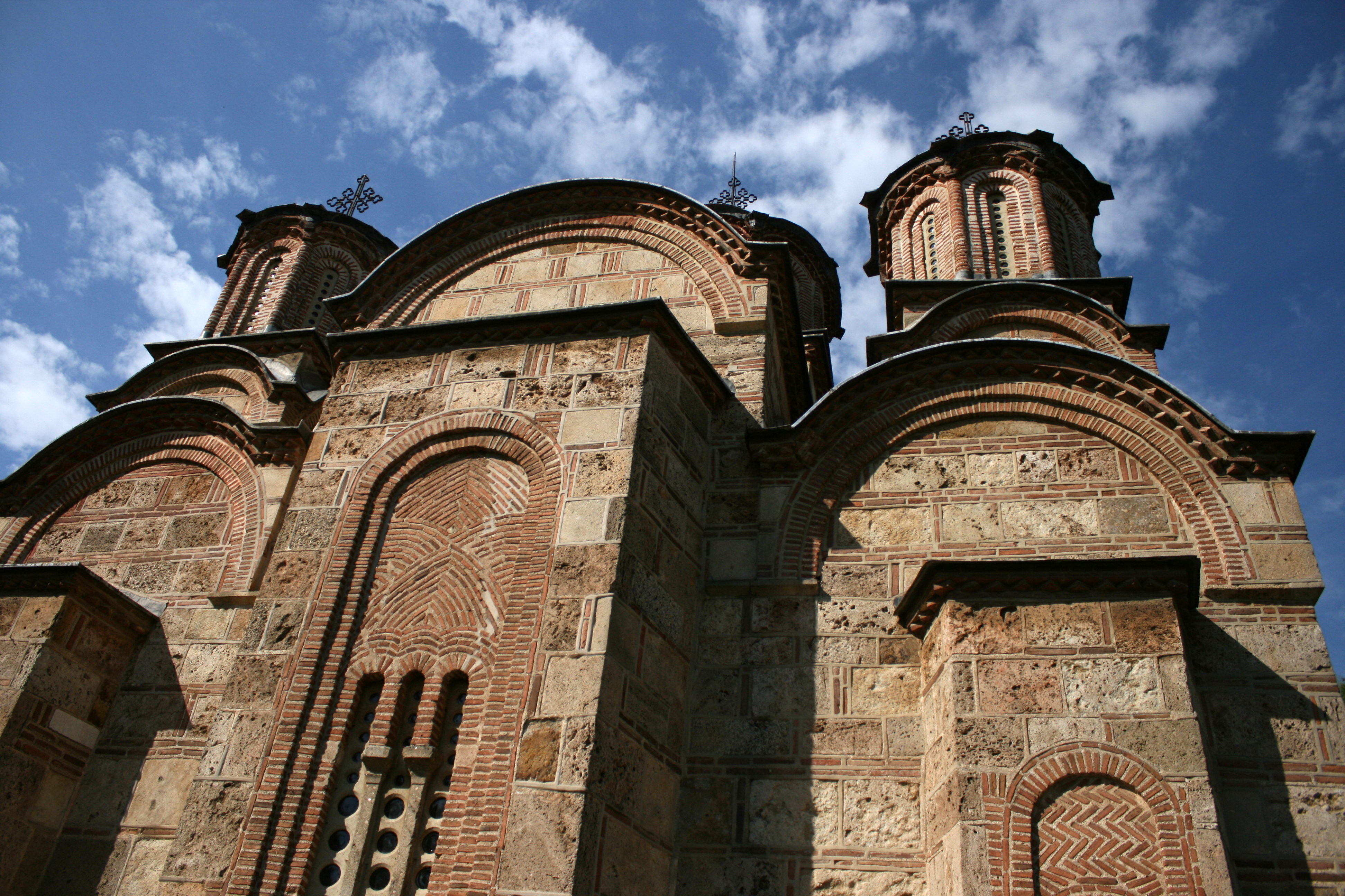 Gračanica